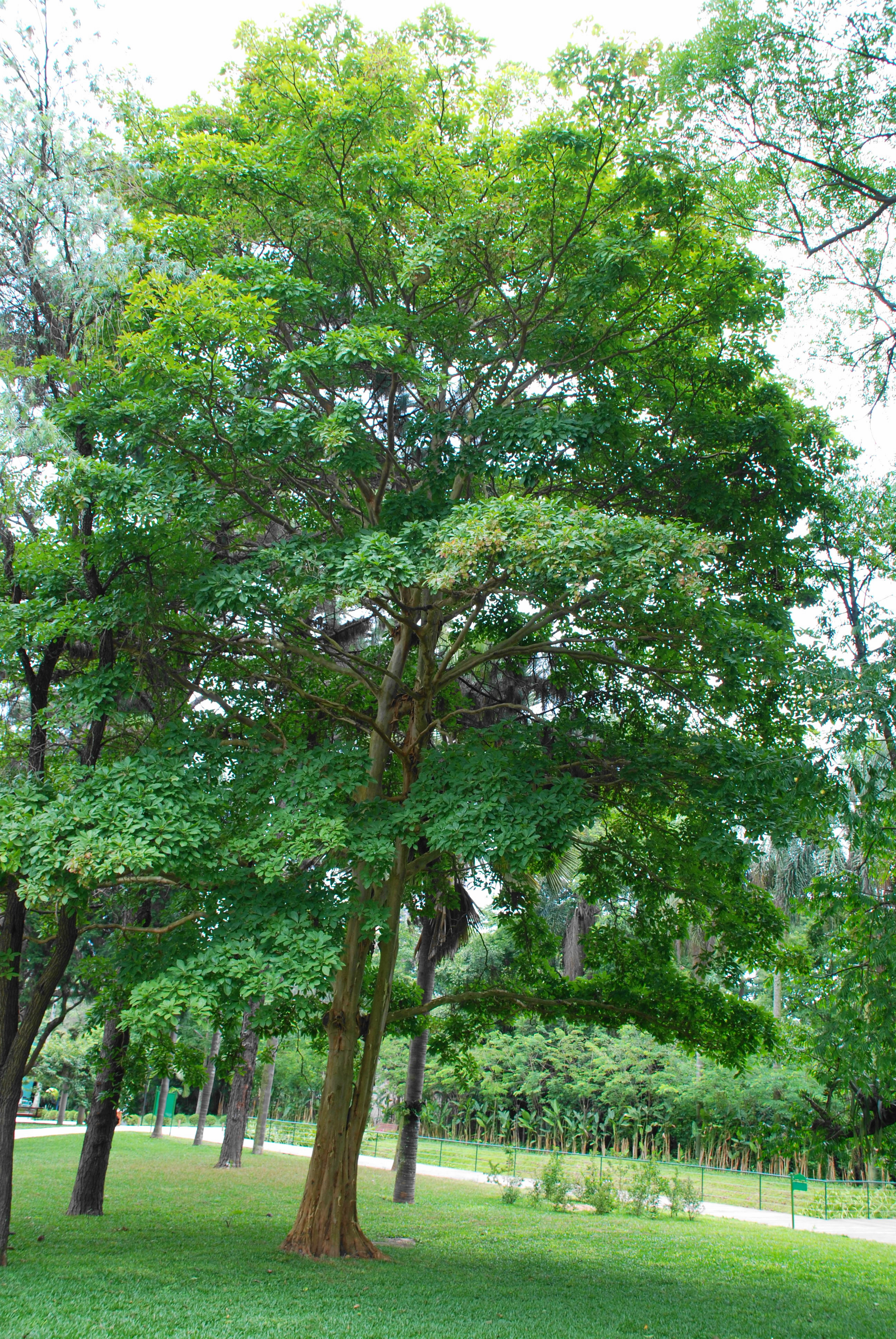 Araçá d´água (Terminalia kuhlmannii), Arboretum Bot. garden São Paulo